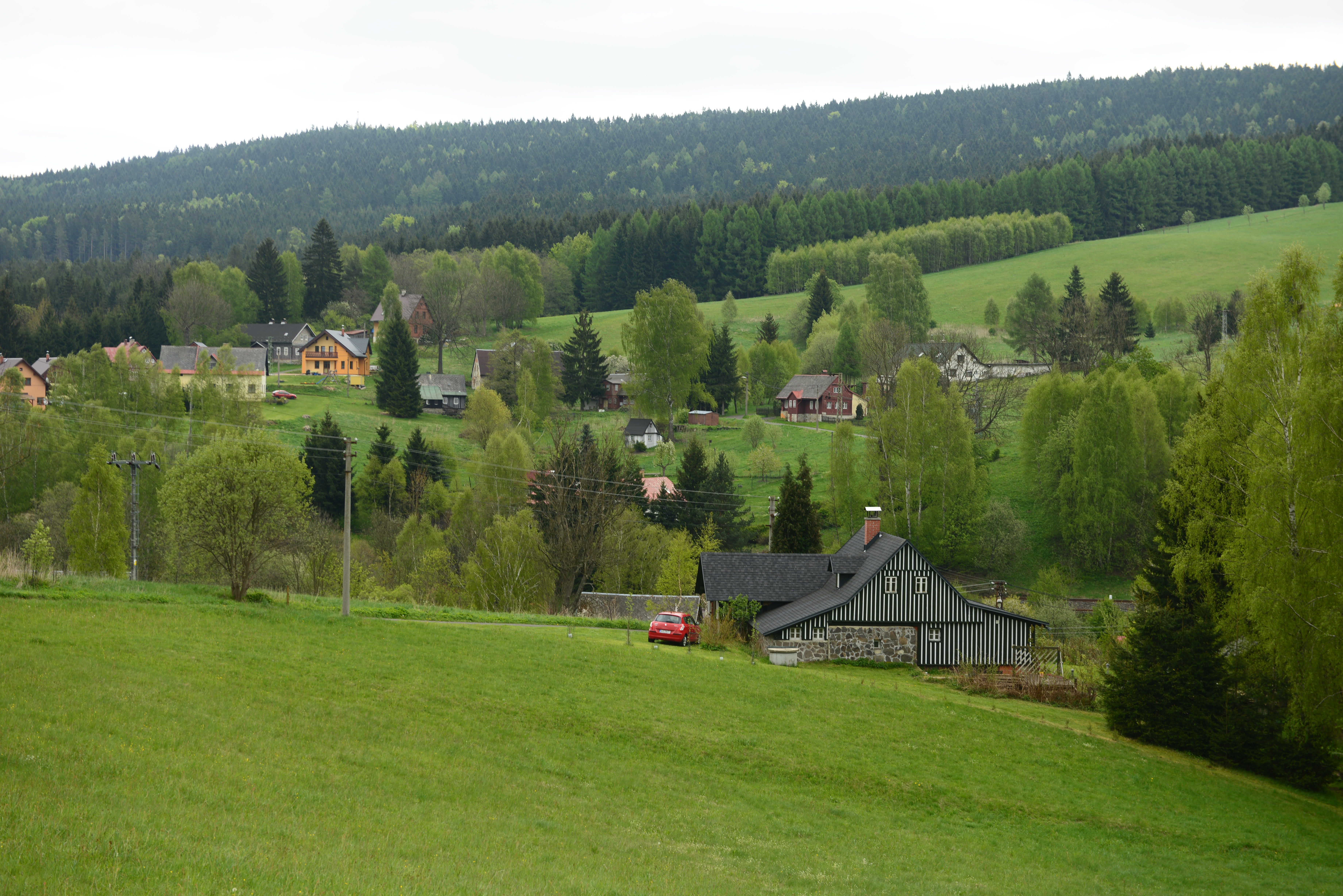 Střední Smržovka